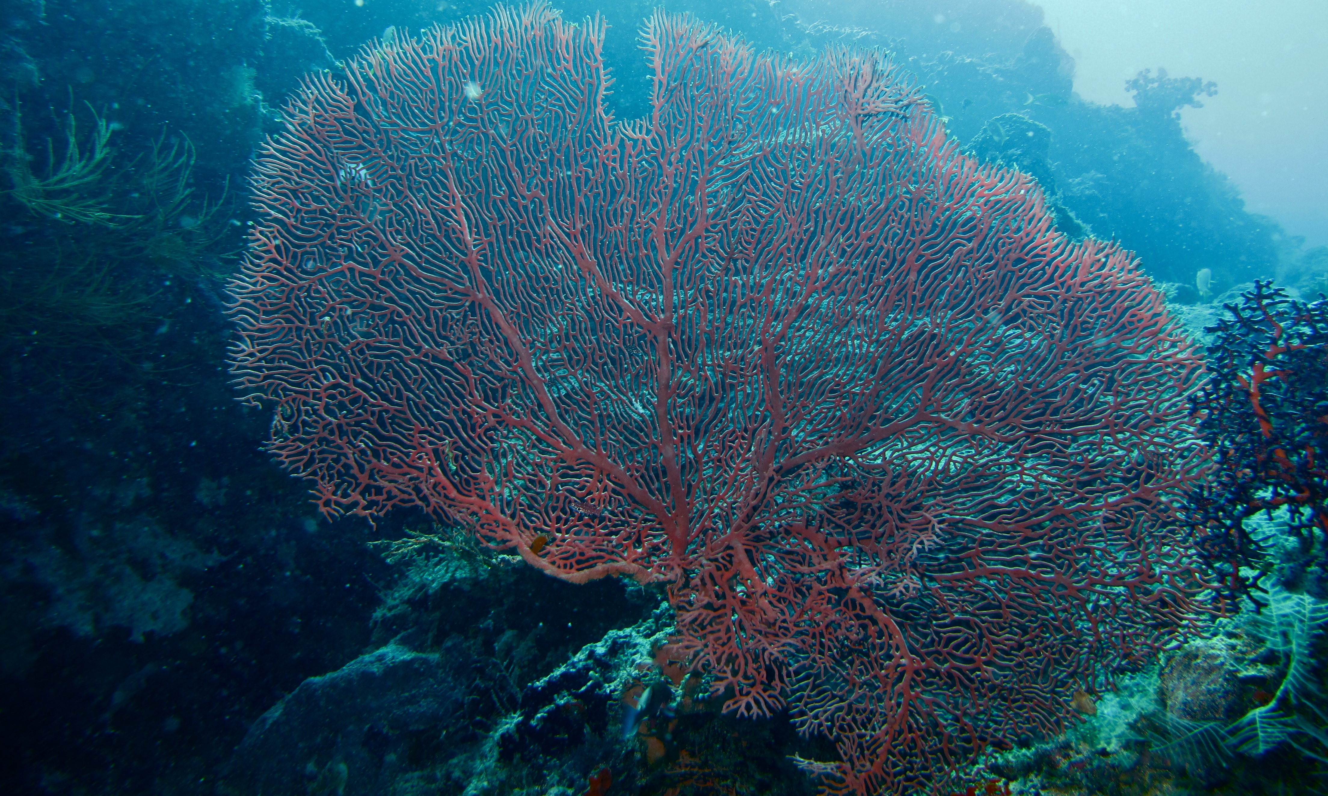 Hanging Gardens, Pulau Sipadan, Sabah, MALAYSIA